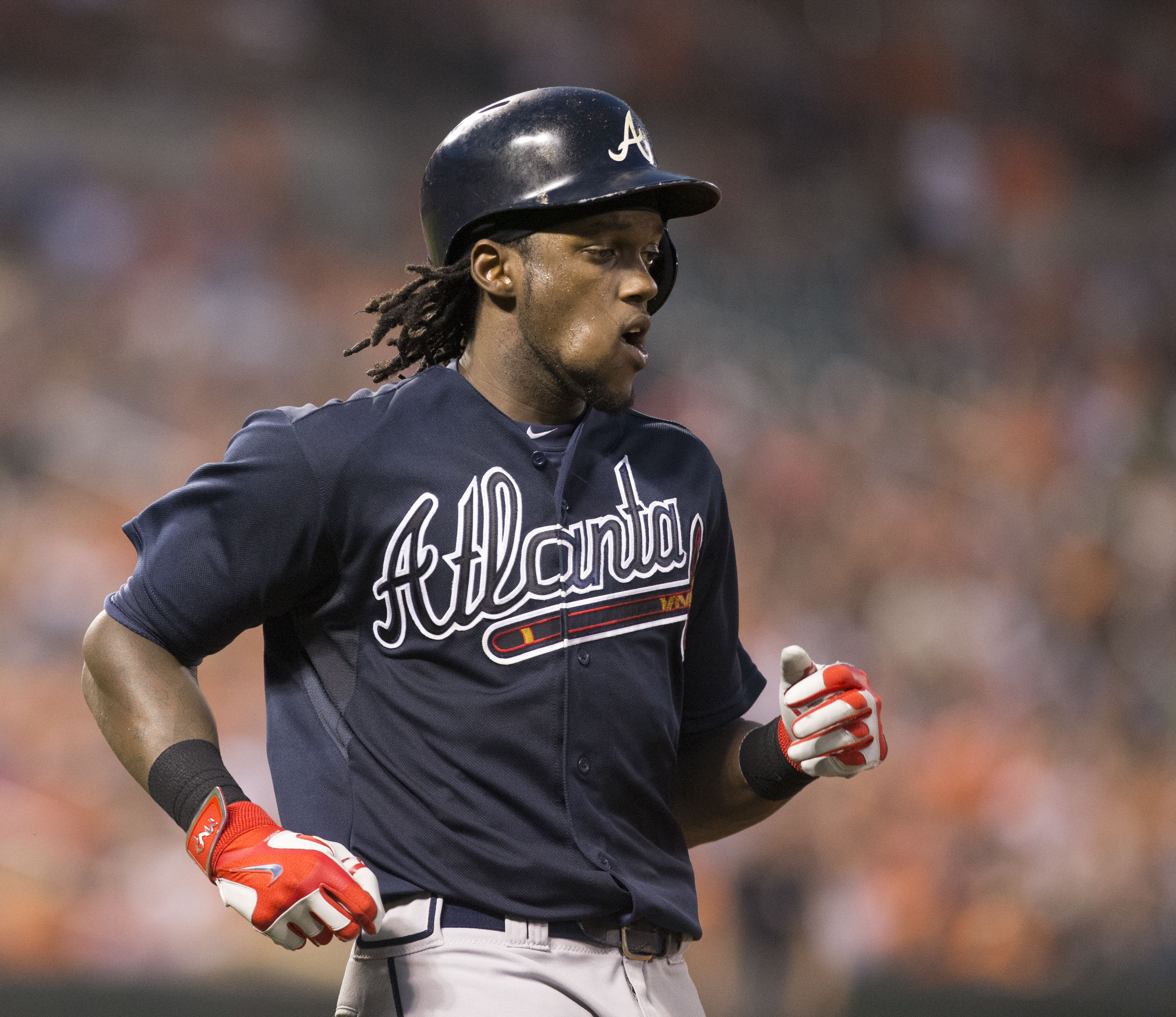 Braves at Orioles 7/29/15